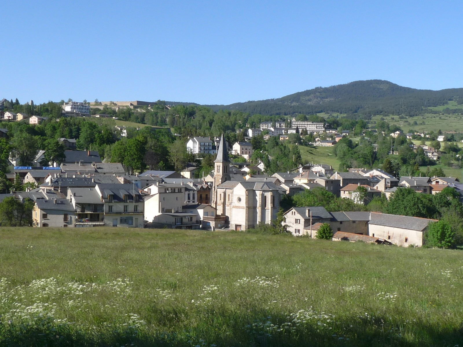 La Cabanasse, Pyrénées-Orientales, France